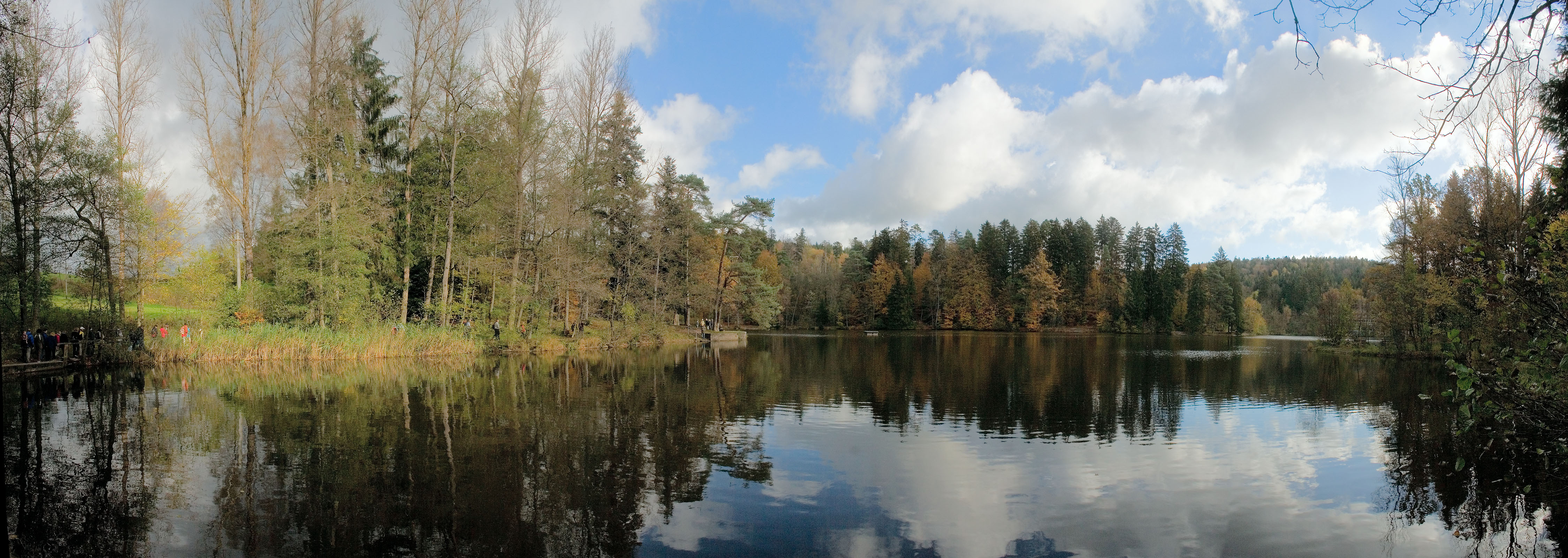 Panoramablick über den Ebnisee